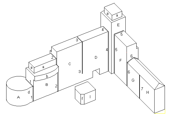 Corps de bâtiments en béton